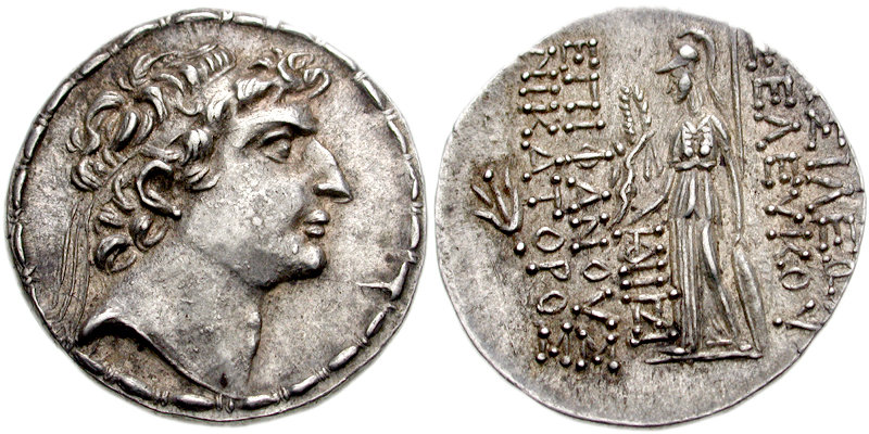 Seleuco VI Epifanes Nikator, tetradracma